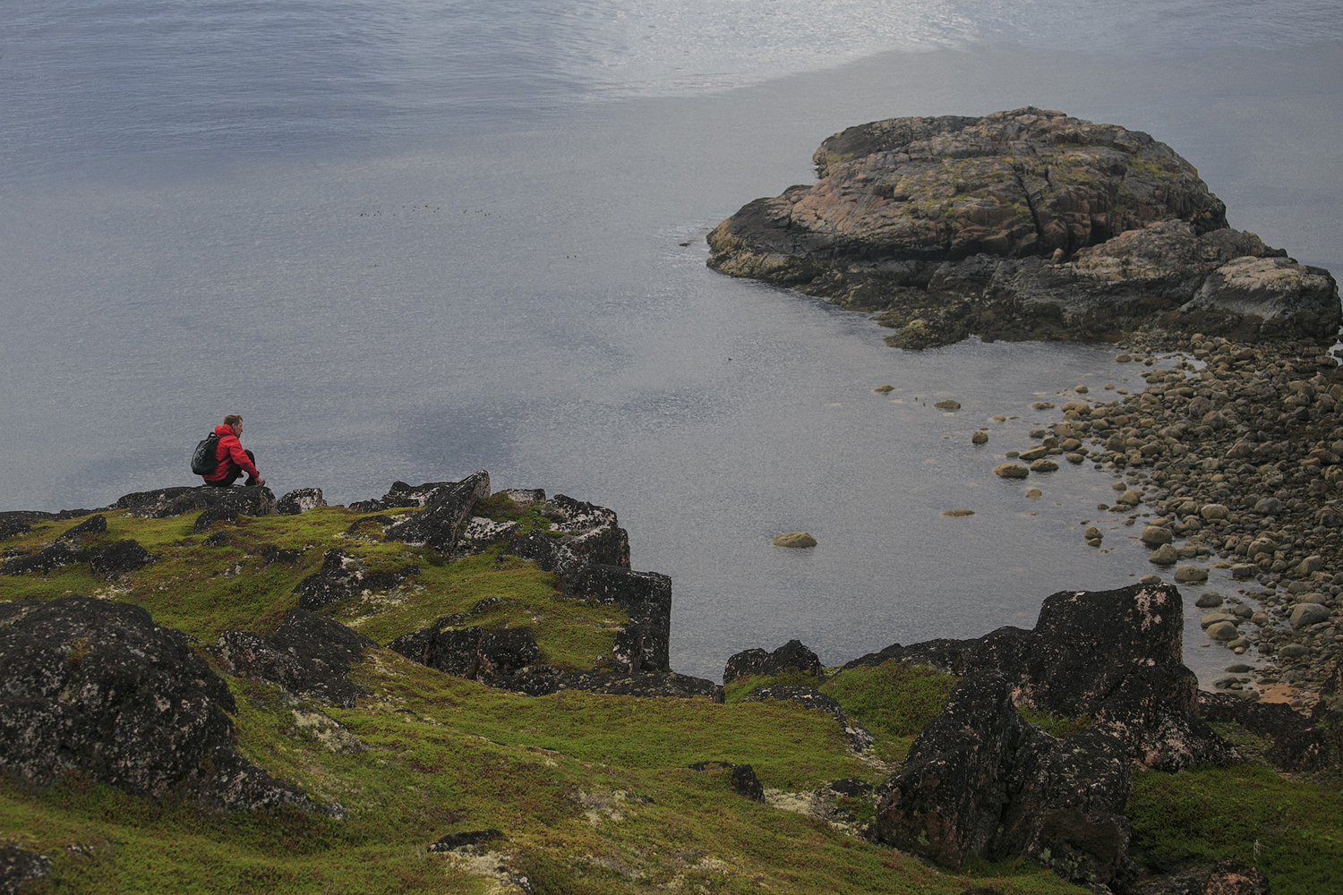 Губа Воронья: Западное побережье Кандалакшского залива Белого моря, побережья губ Воронья и Белая, остров Волей и безымянный остров между островом Волей и материком, Кандалакшский район, Мурманская область This image is related to the protected area of Russia number 5110017